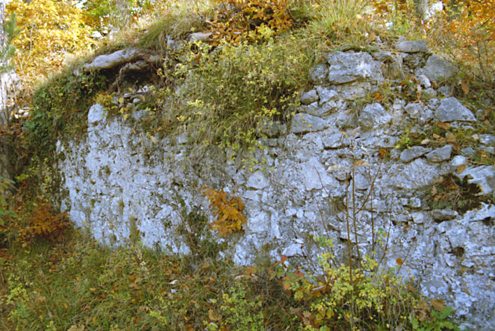 Mauerreste der jüngsten Bauphase der Burg Bärenfels, Aesch